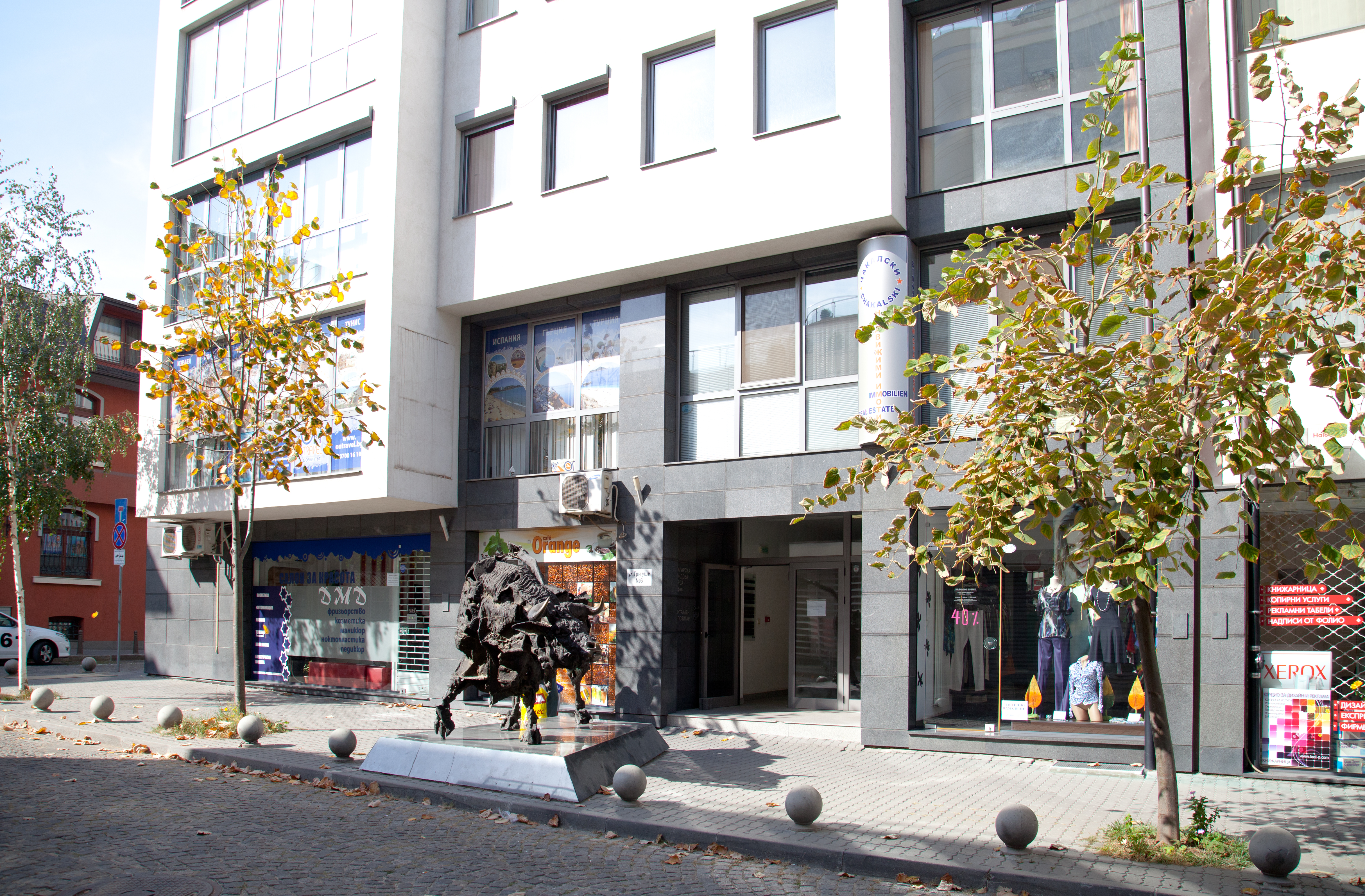 Sofia